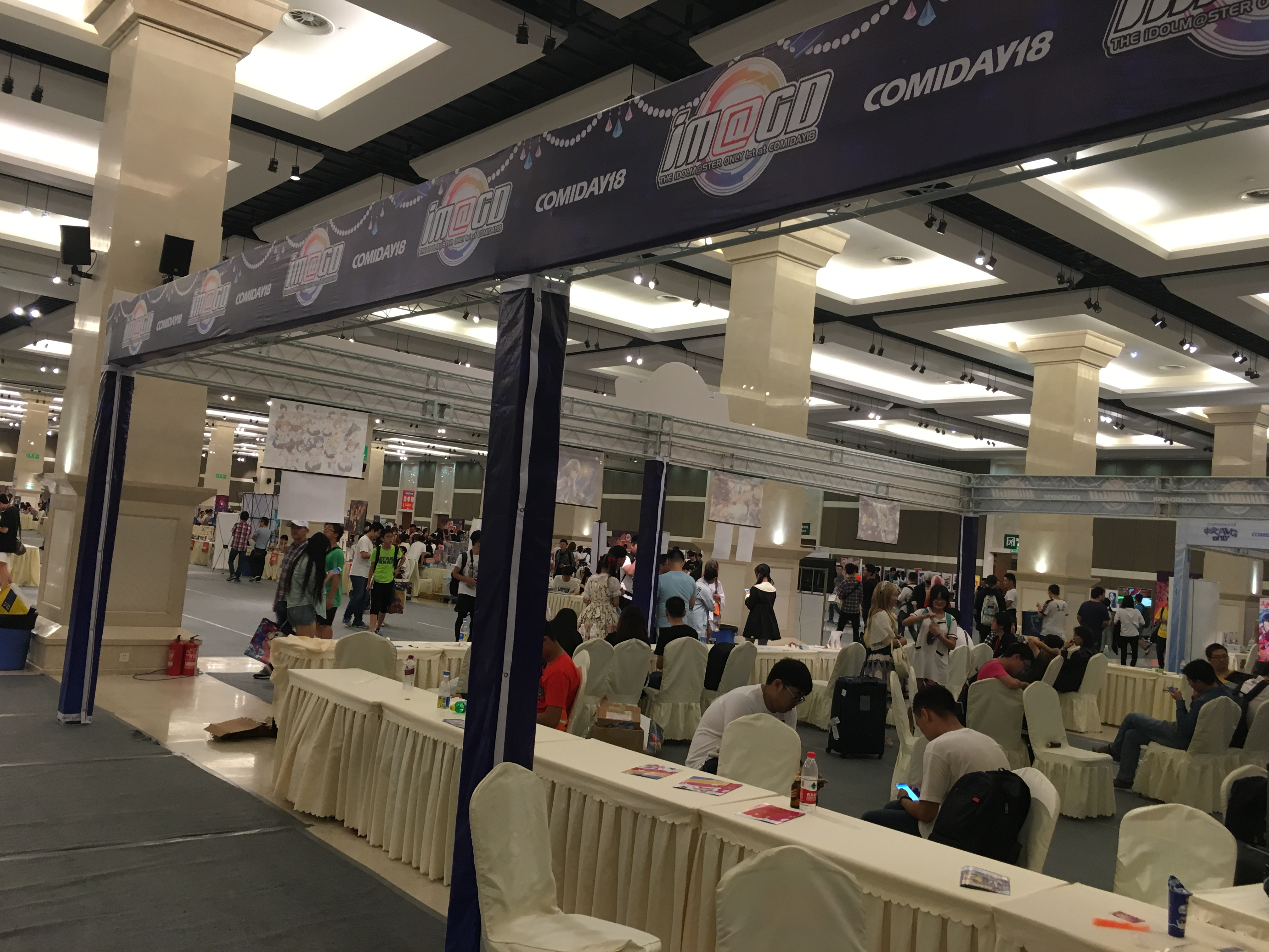 中文（中国大陆）: Comiday18会场内部